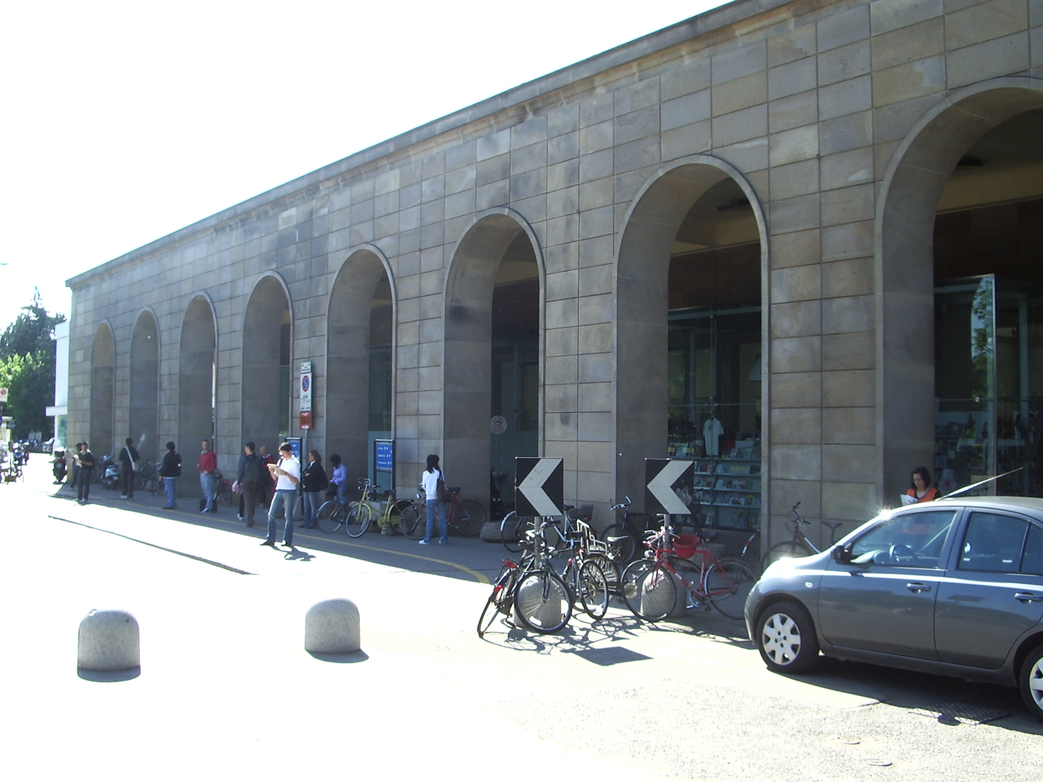 Esterno stazione di Vicenza